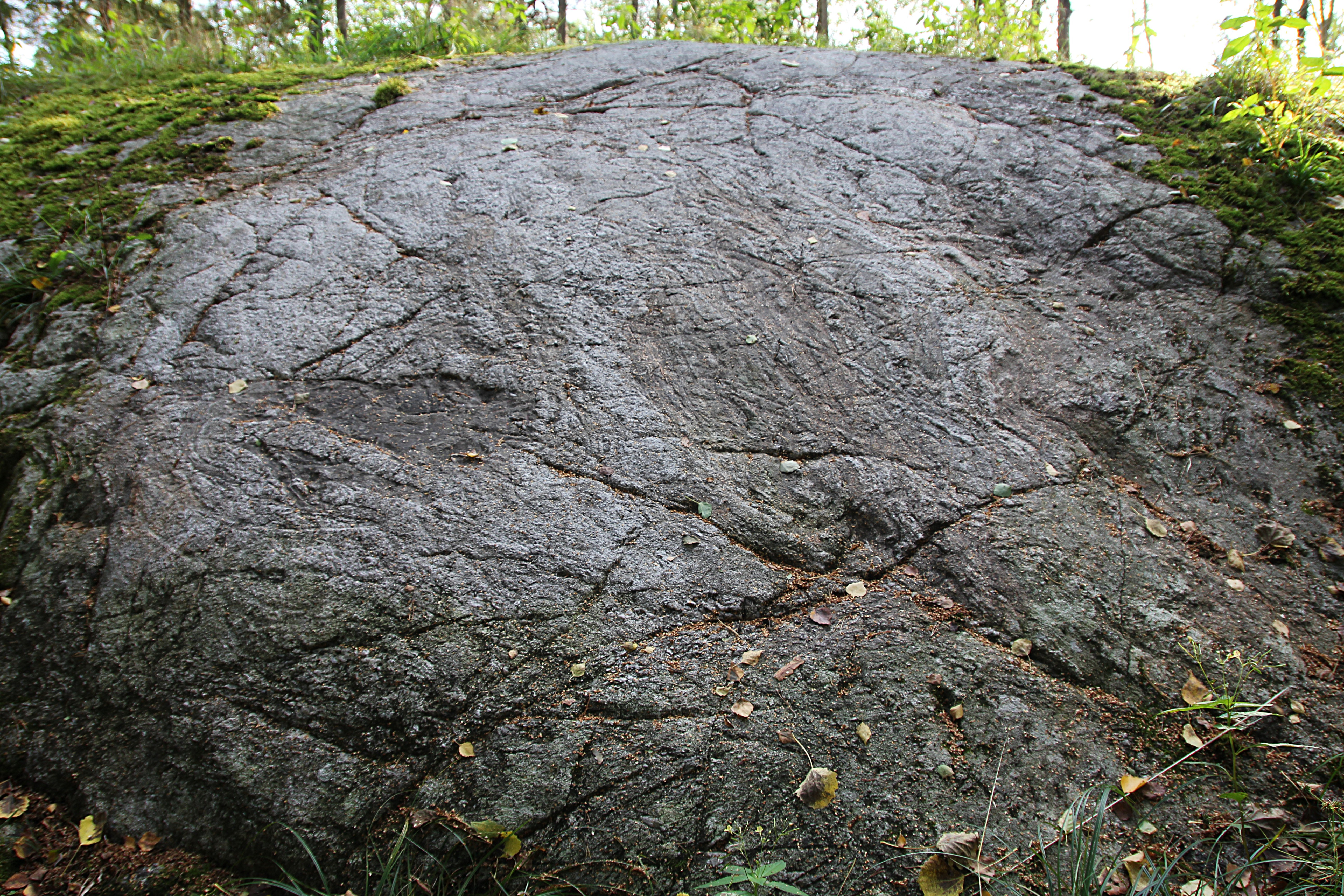 Runhällen U RR1987;134 (Granbyhällen) i Husby, Stockholm.